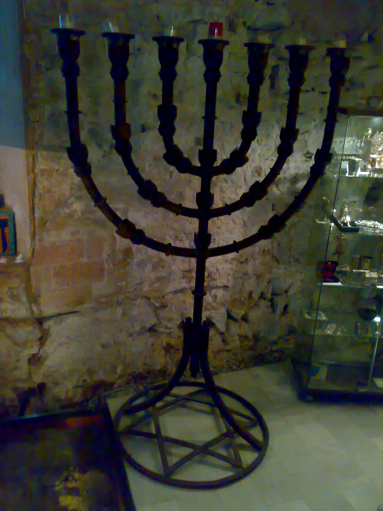 Menorá en la sinagoga Shlomo ben Aderet, del Call (antiguo barrio judío) de Barcelona